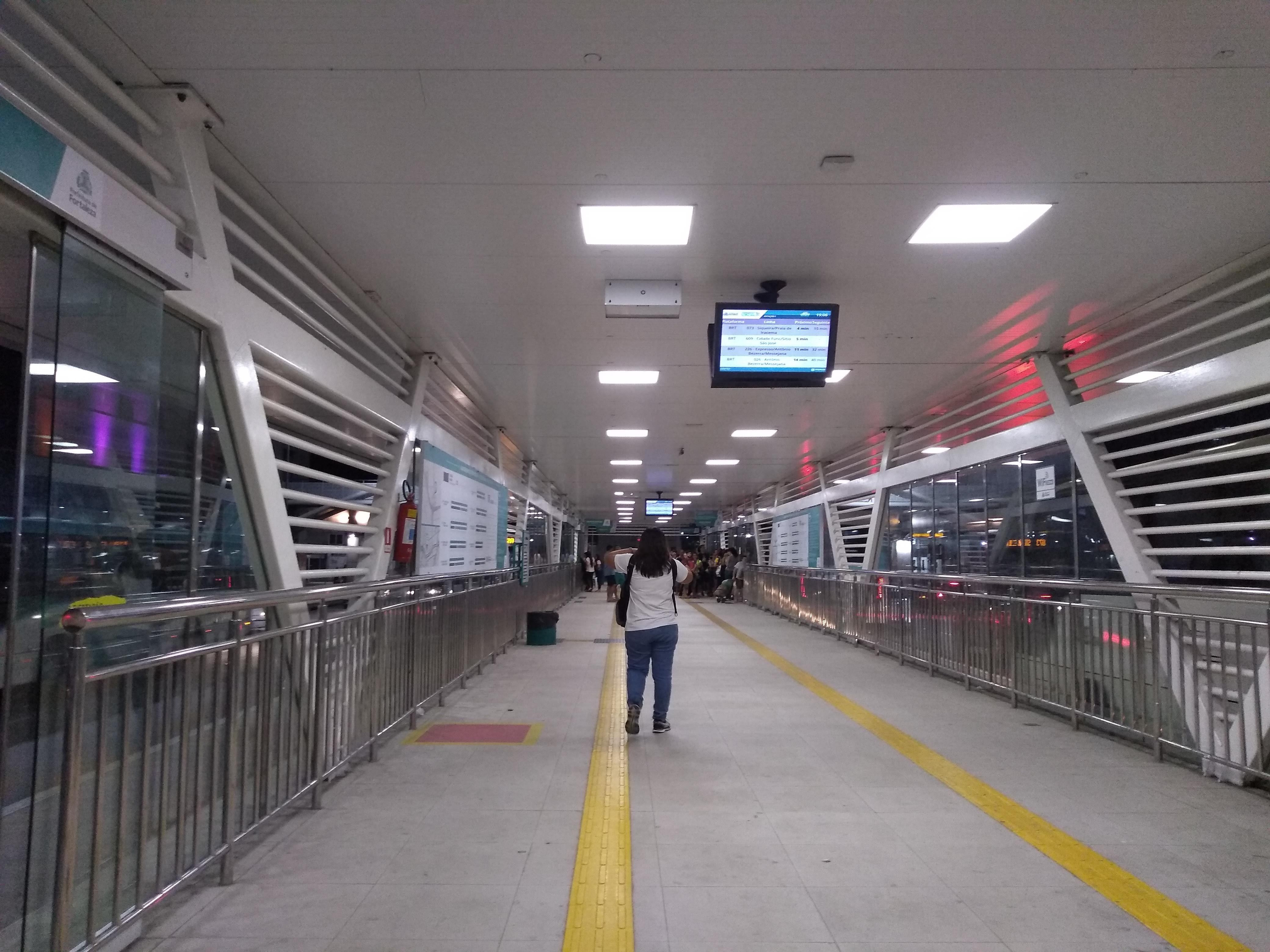 Sistema de BRT Expresso Fortaleza localizado na avenida Aguanambi na cidade de Fortaleza, Ceará, Brasil.